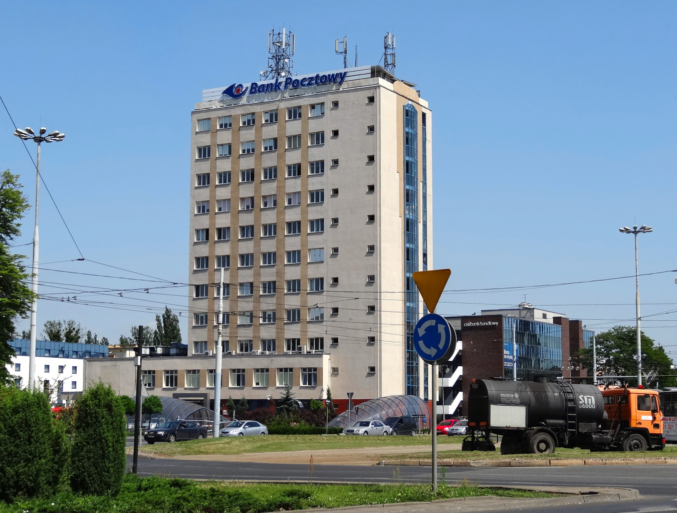 Bank Pocztowy w Bydgoszczy przy ul. Jagiellońskiej